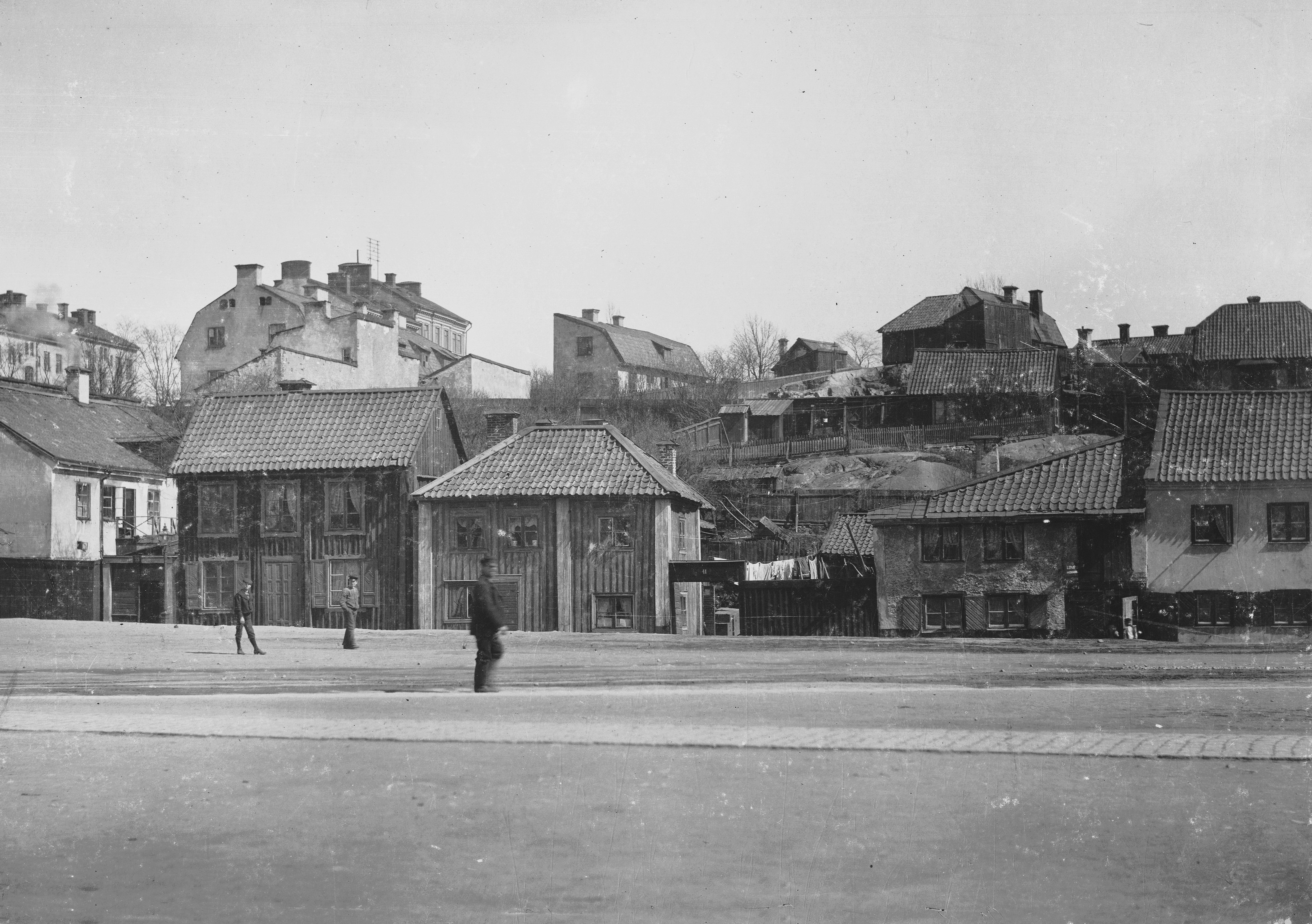 Fastigheten Bondesonen större 21, dagens Nytorget 3-7